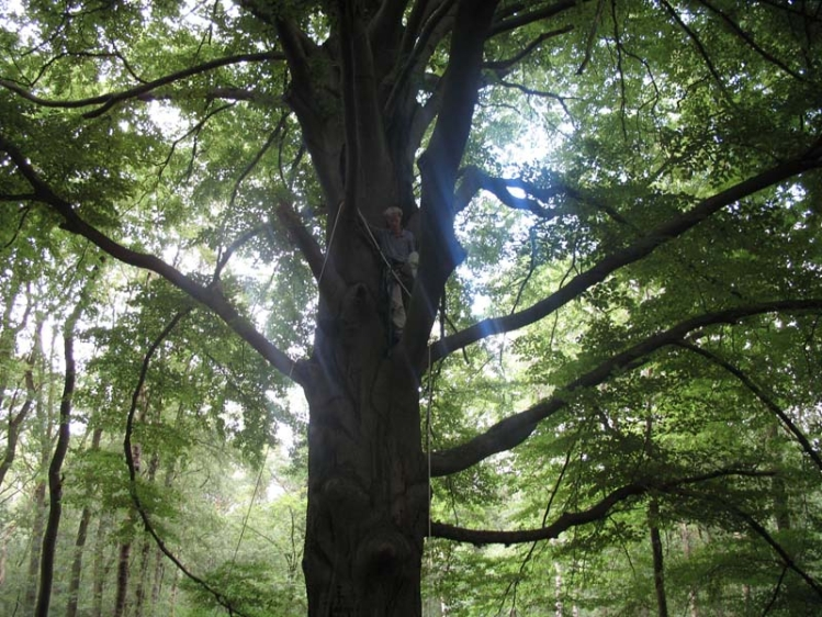 Actievoerders beklimmen boom (Vereniging STOP awacs)